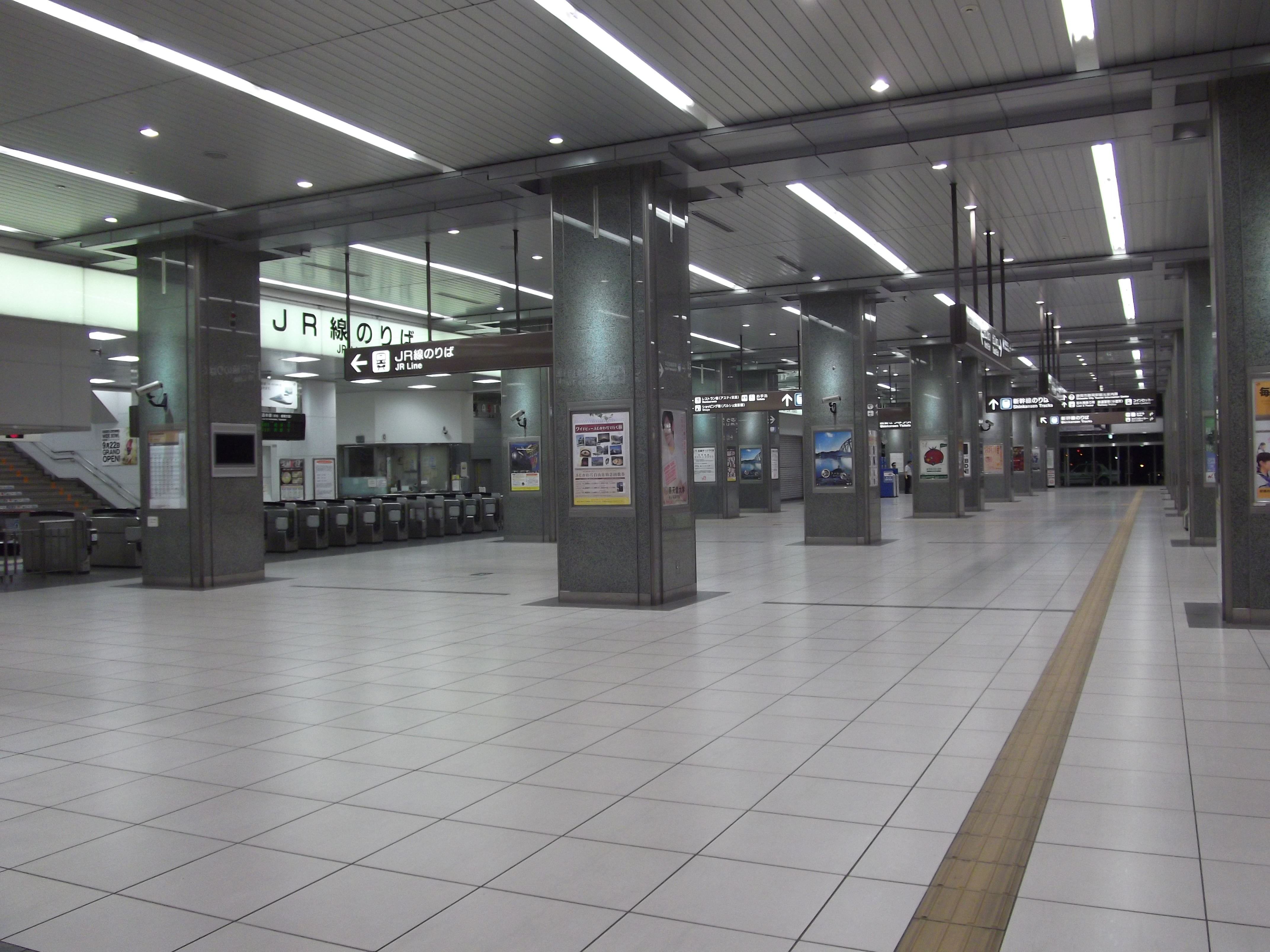 静岡駅のコンコース